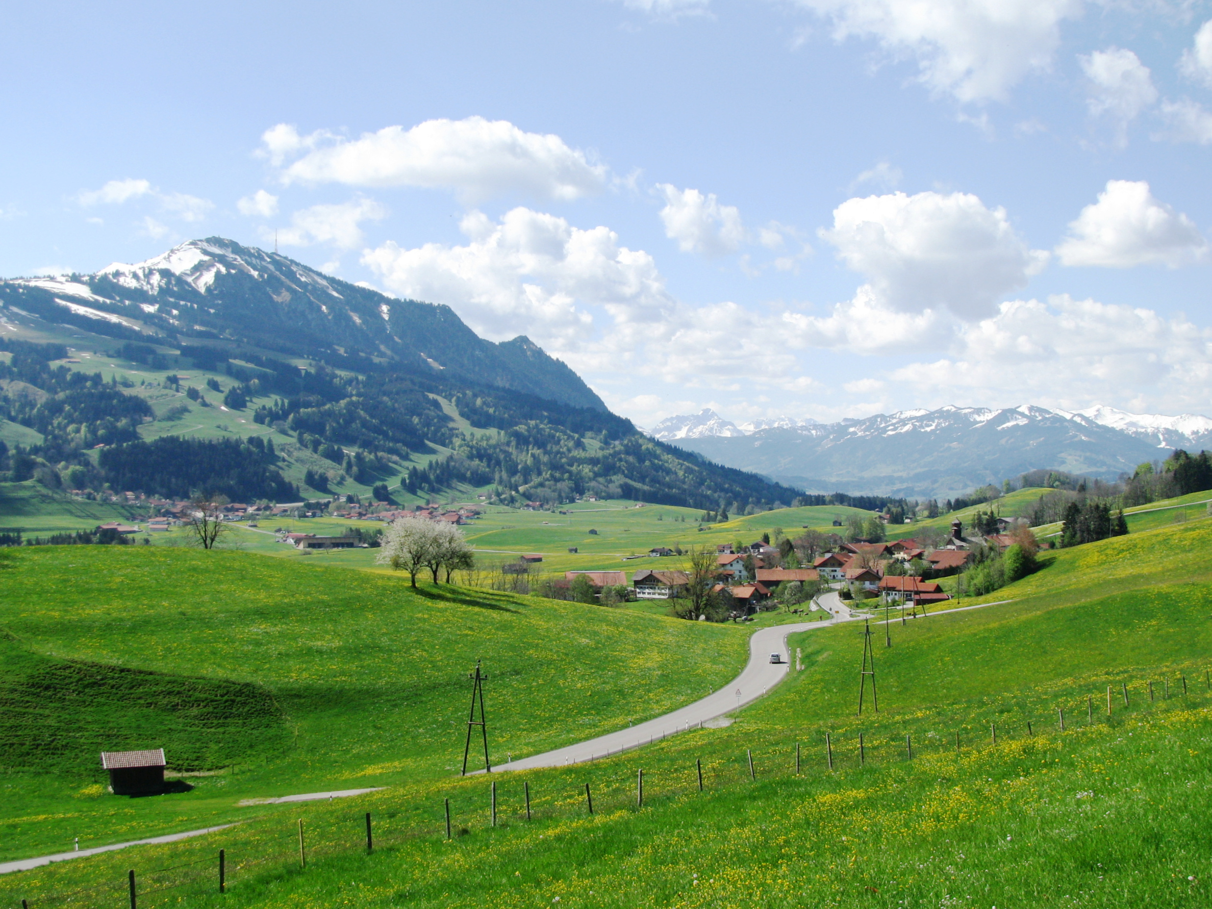 Emmereis in der Gemeinde Rettenberg im Oberallgäu, mit Bergen der Allgäuer Alpen, links der Grünten